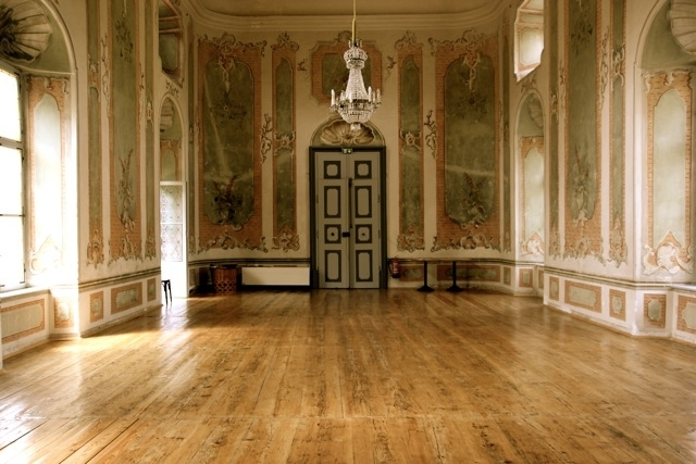 Rittersaal - Schloss Sankt Georgen an der Stiefing (Stmk./Ö)